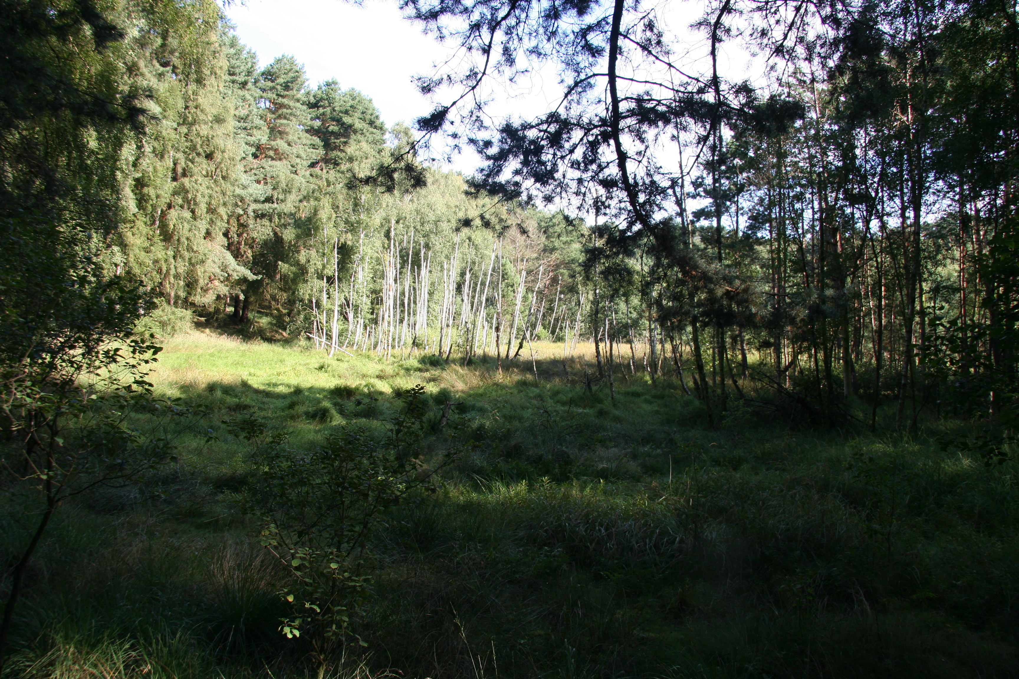 FFH-Gebiet Teufelsluch westlich von Schuhlen-Wiese in Brandenburg